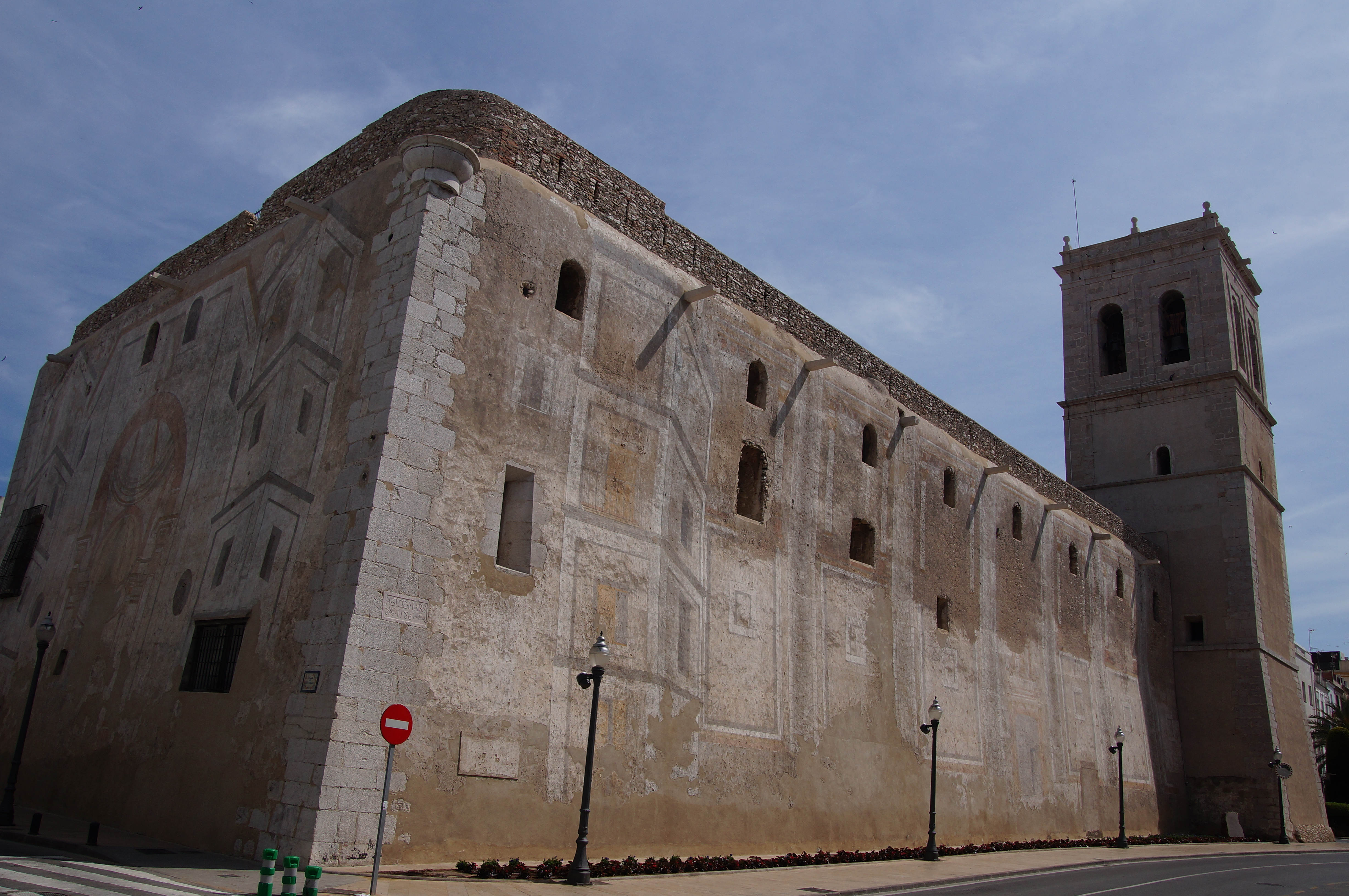 Església parroquial de l'Assumpció (Vinaròs)